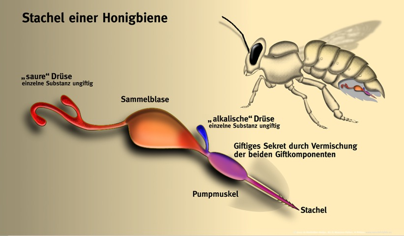 Stachel der Honigbiene - Infotafel im NABU Wasservogelreservat Wallnau (Fehmarn)